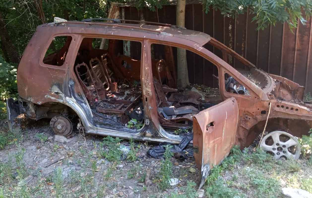 Сгоревший автомобиль Mazda главы Антирейдерского союза Андрея Семидидько в 2014 году. Фото 2020 года, г. Киев, учебный центр «РЕАЛИСТ».